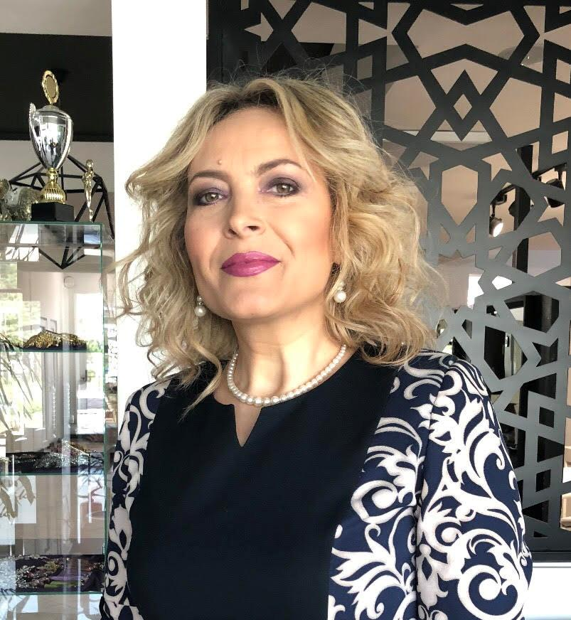 Migena Arllati, gazetare, poete, albanologe shqiptare.